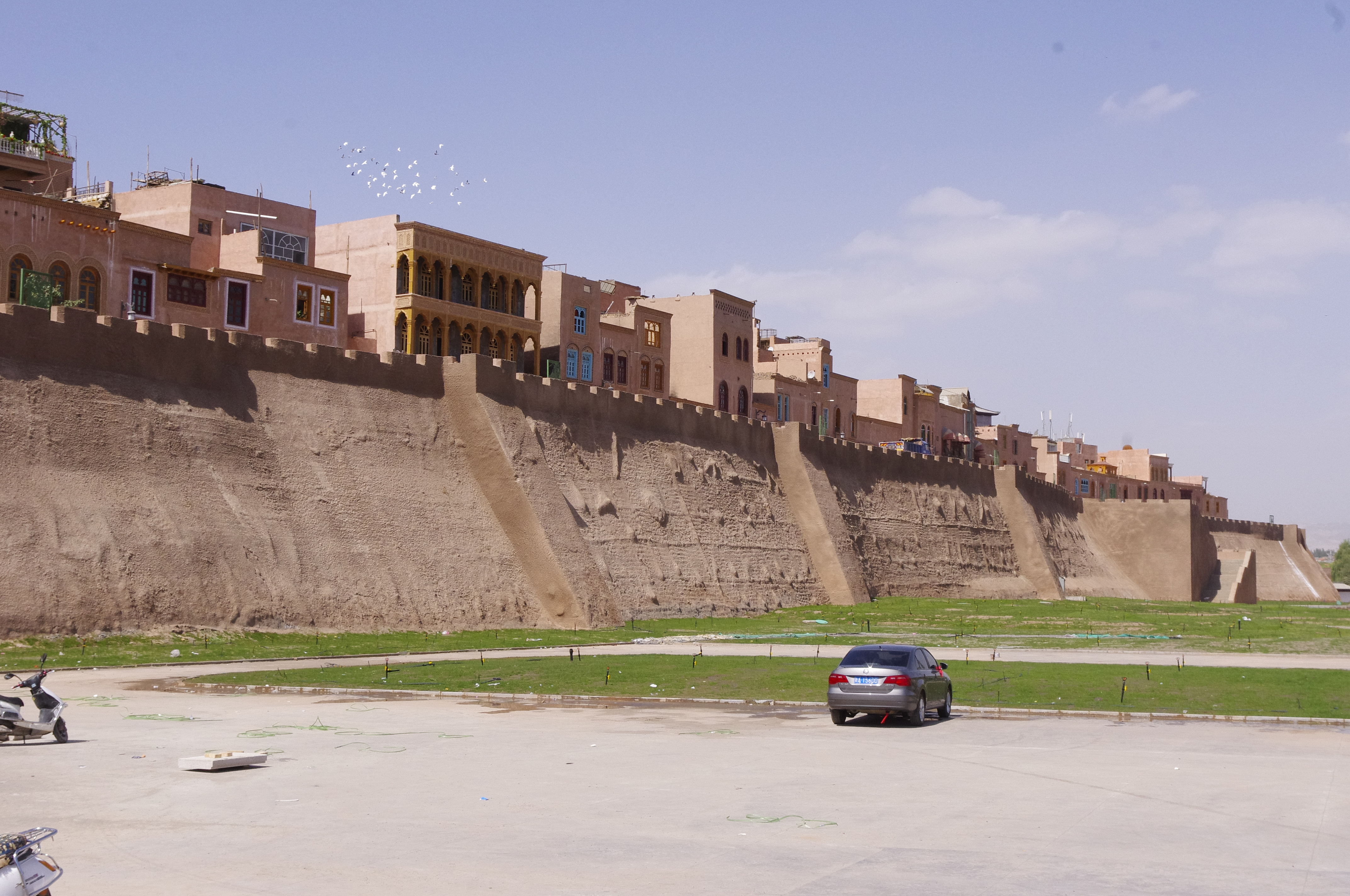 The making of this document was supported by Wikimedia Polska. To zdjęcie zostało wykonane podczas Wikiwyprawy 2015. Wszystkie zdjęcia z wyprawy możesz zobaczyć w kategorii: Wikiwyprawa 2015. English | polski | +/− To zdjęcie zostało załadowane dzięki współpracy z firmą Hyperbook. polski | +/− To zdjęcie zostało załadowane dzięki współpracy z firmą: Kopex Group. English | polski | +/−